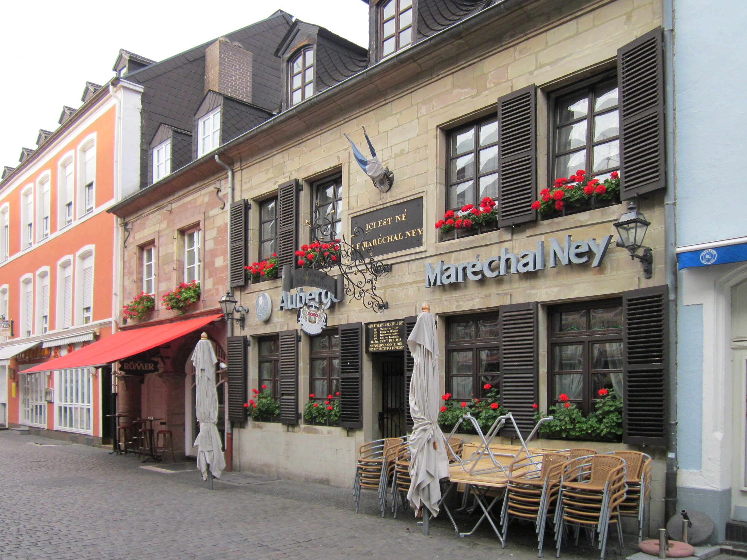 Marschall Ney Haus in Saarlouis